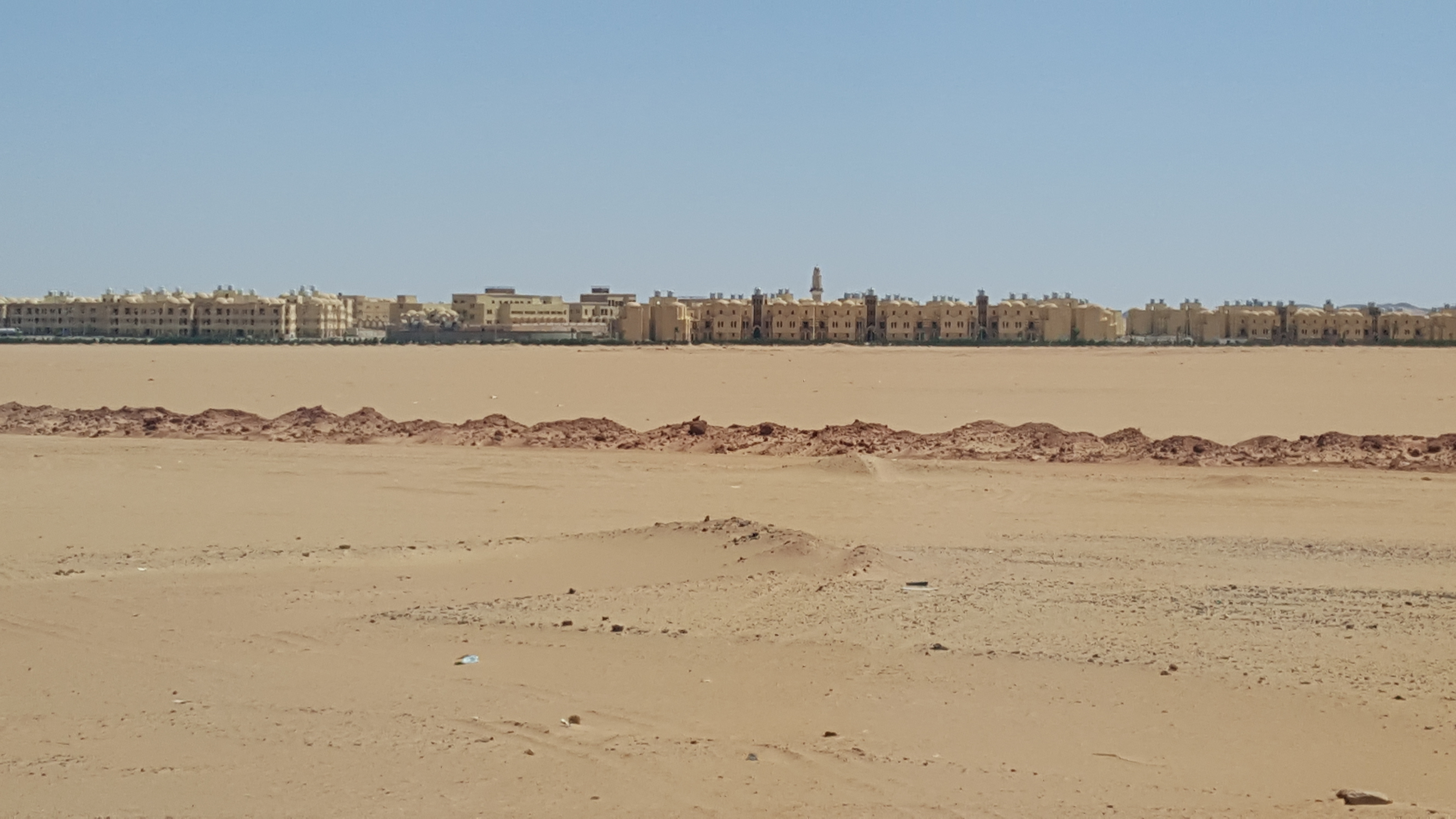 Toshka New City - New Valley Governorate